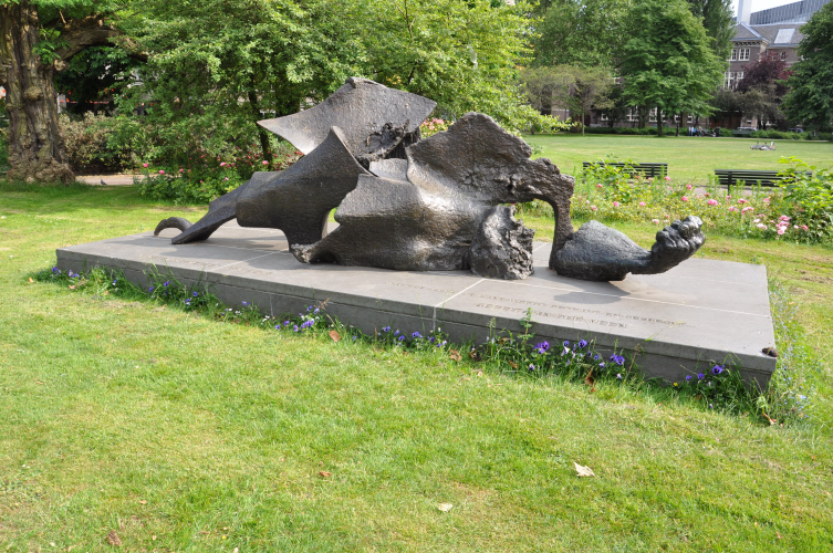 Kunstenaarsverzet onder leiderschap van Gerrit van der Veen Lokatie: Plantsoen Plantage Westermanlaan, Amsterdam Kunstenaar: Carel Kneulman Jaartal: 1973 Materiaal: gegoten brons Foto © Gus Maussen